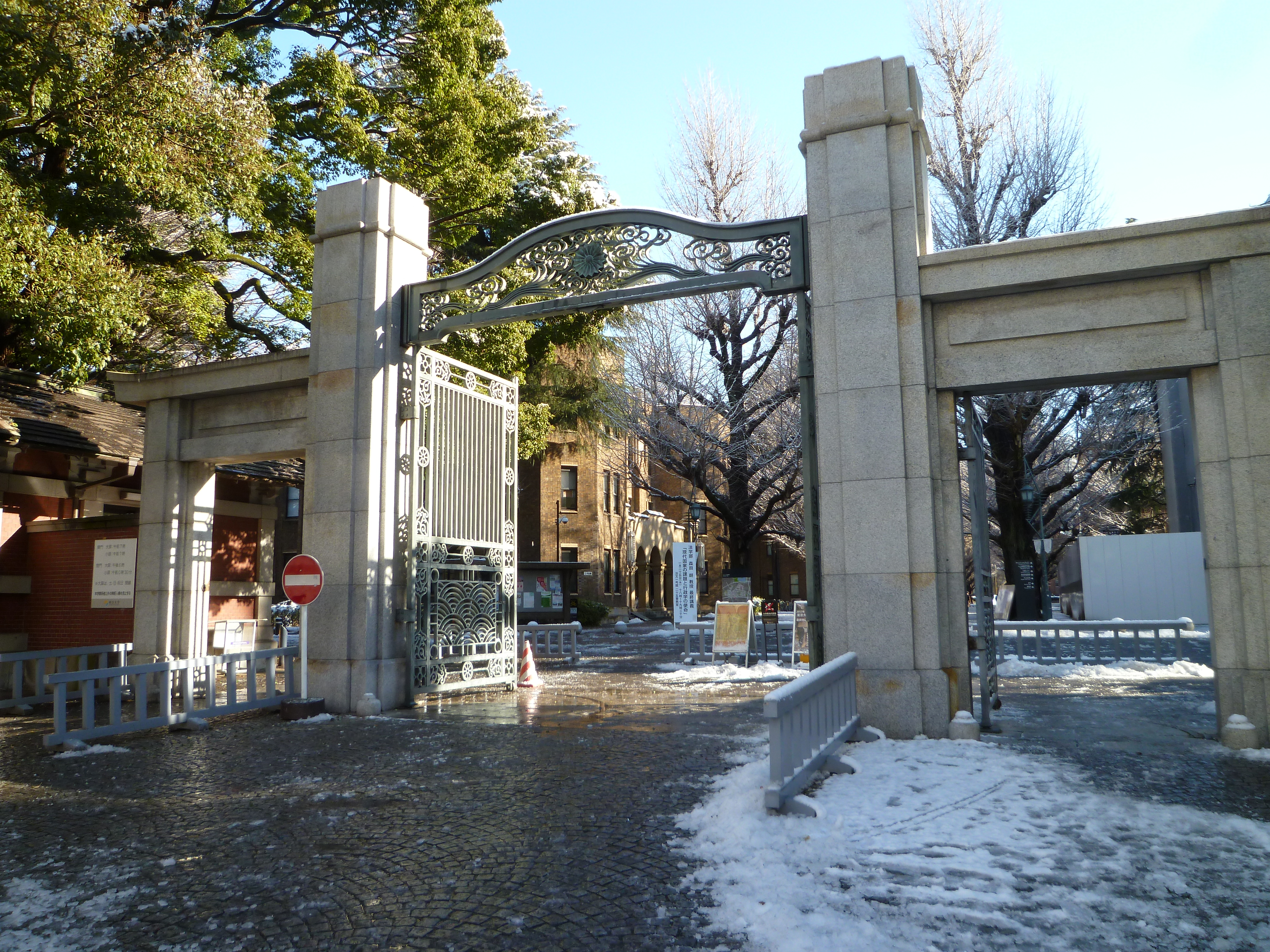 題名に準ずる